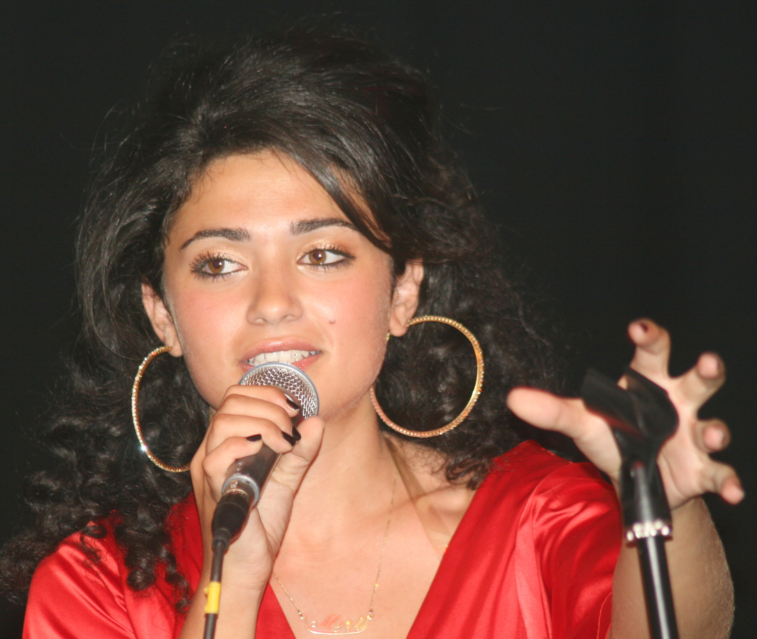 Meri Voskanian 1. Single Release